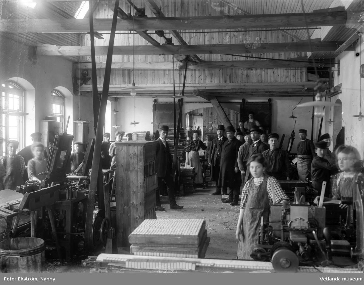 Bild som visar Hvetlanda tändsticksfabrik år 1910. I bilden ses barnarbetare vid maskinerna.